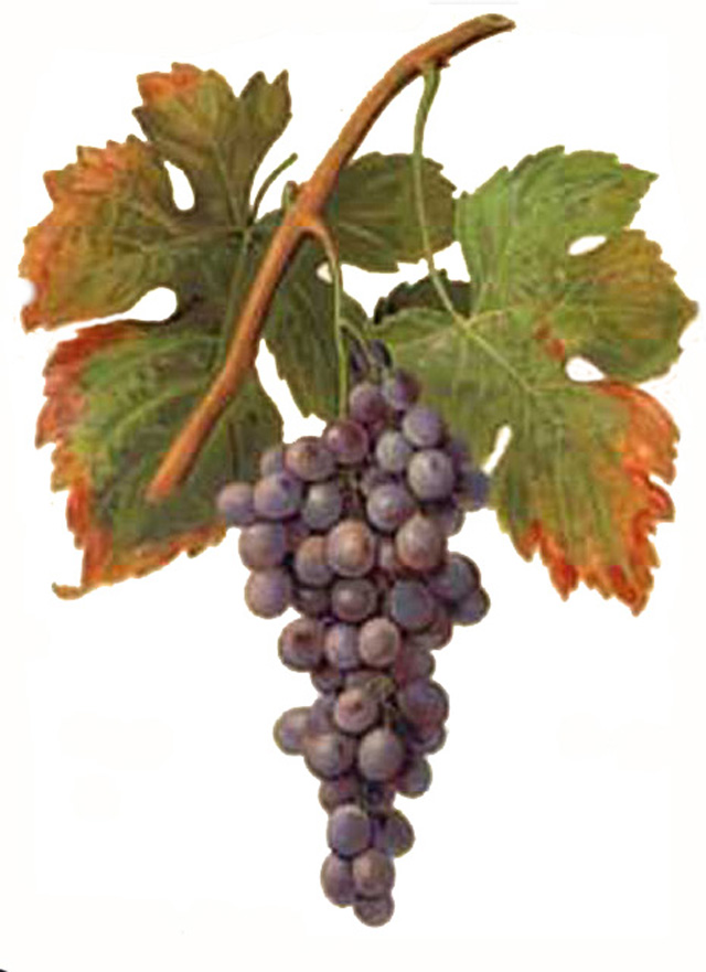 Grappe de Palomino par Viala et Vermorel